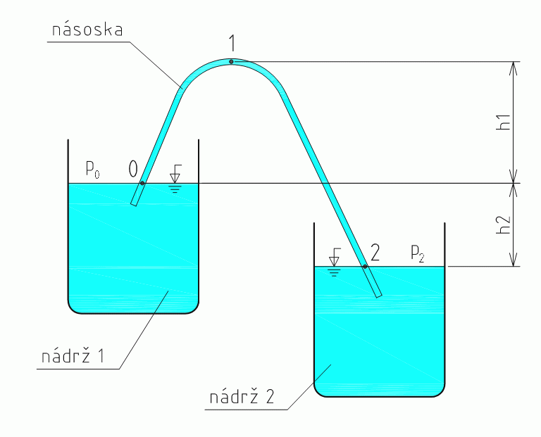 Schéma násosky - jednoduchého přečerpávacího zařízení.